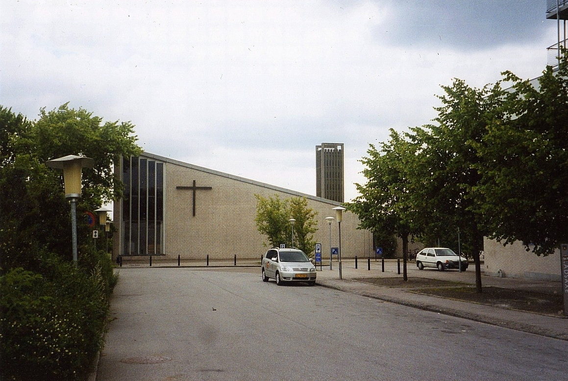 Haraldskirken, Haralds Sogn, Gladsaxe Kommune